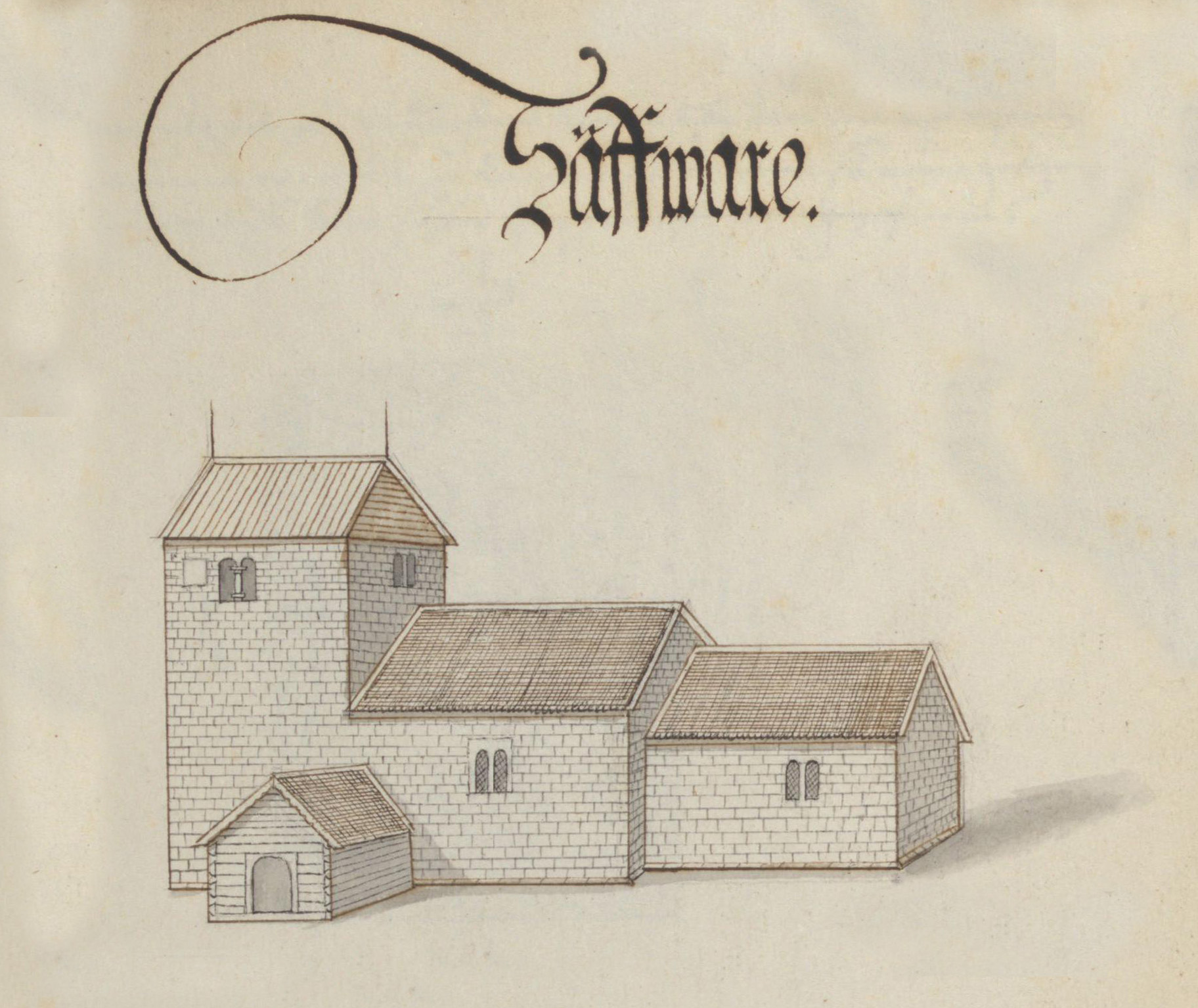 Sävare kyrka. Kyrka, äldre, teckning ur Peringskiölds Monumenta, avfotograferad i färg.